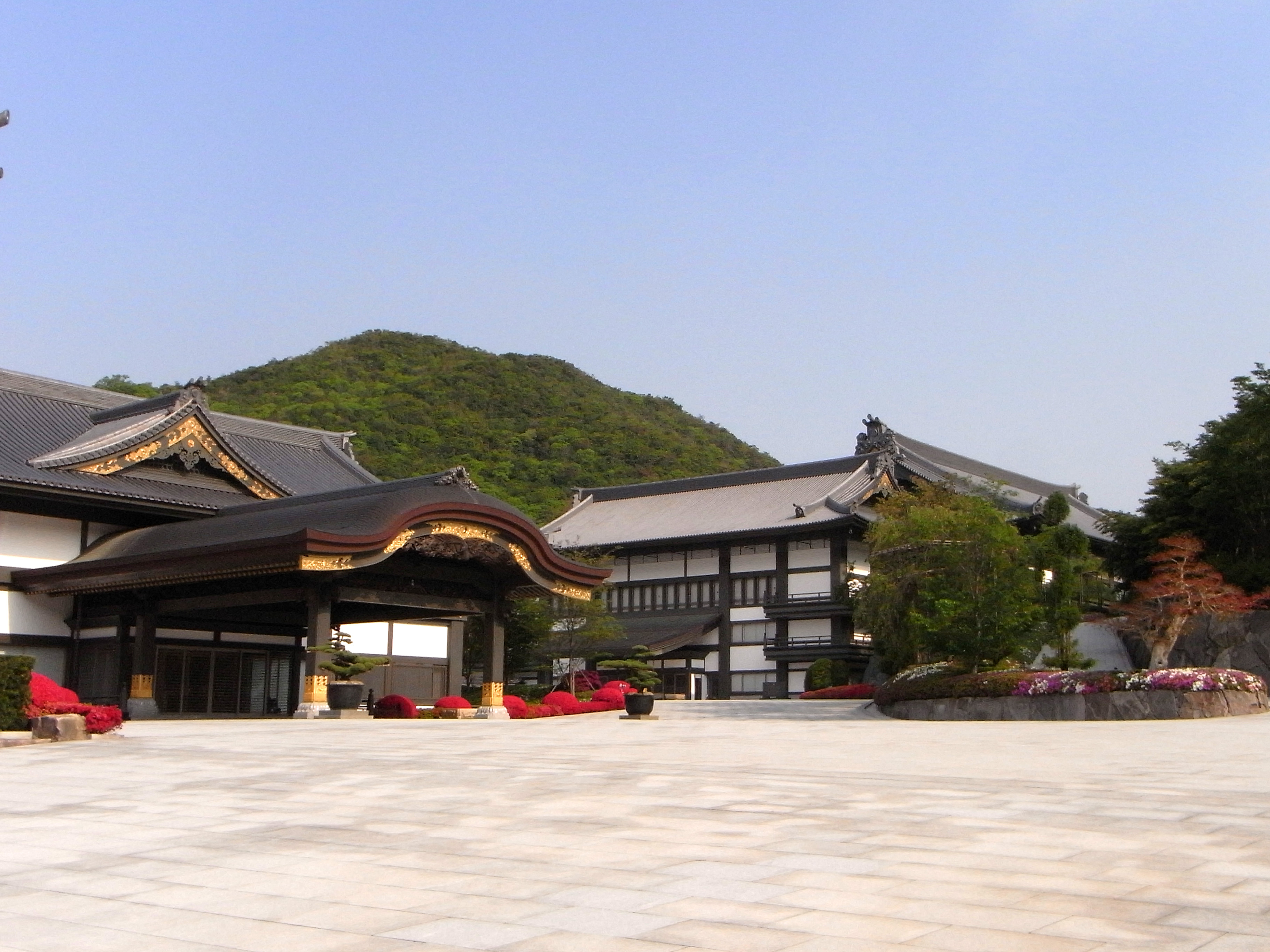 念仏宗(念佛宗)無量寿寺「佛教之王堂」講堂と事務所